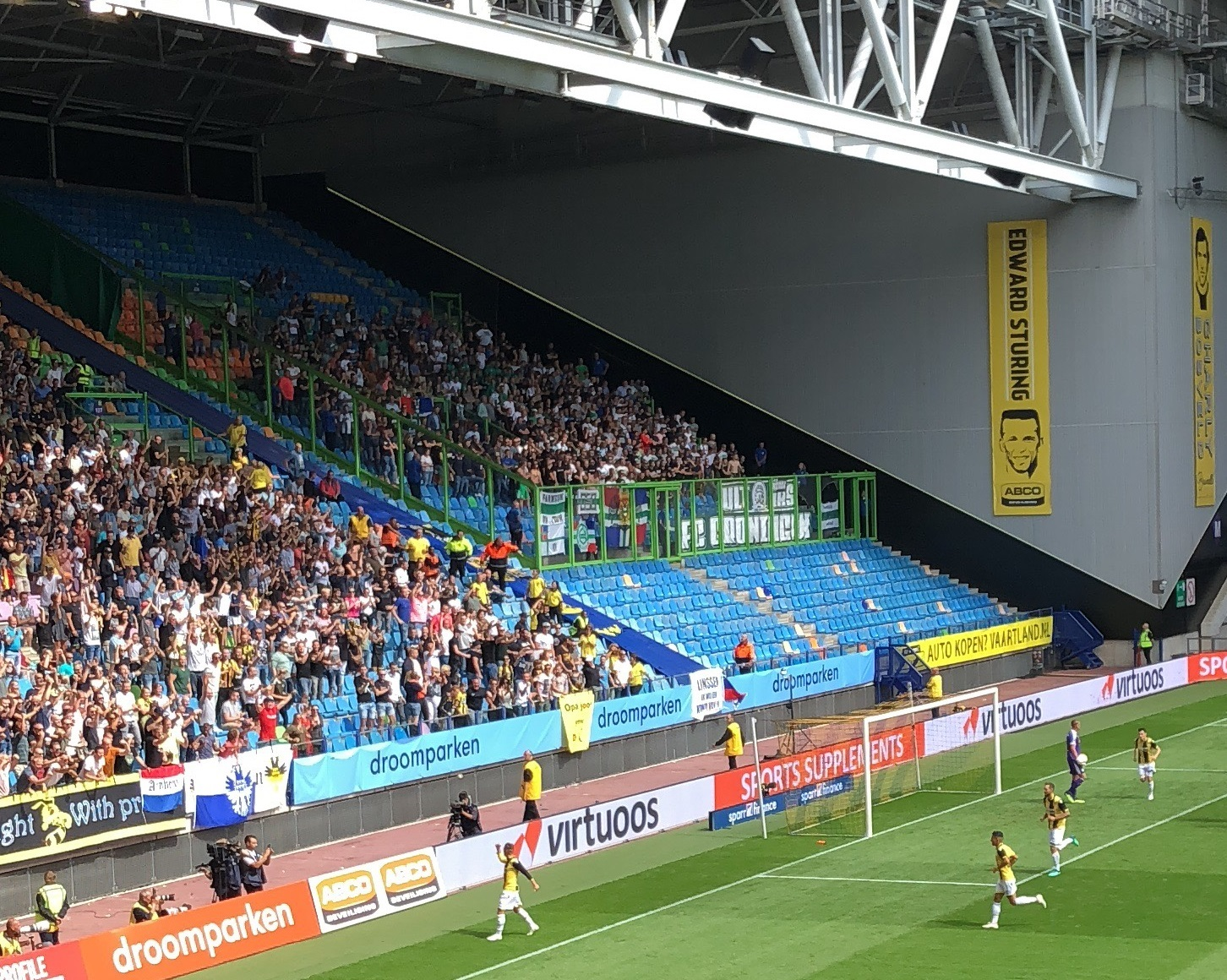 De Noord tribune is vernoemd naar Edward Sturing